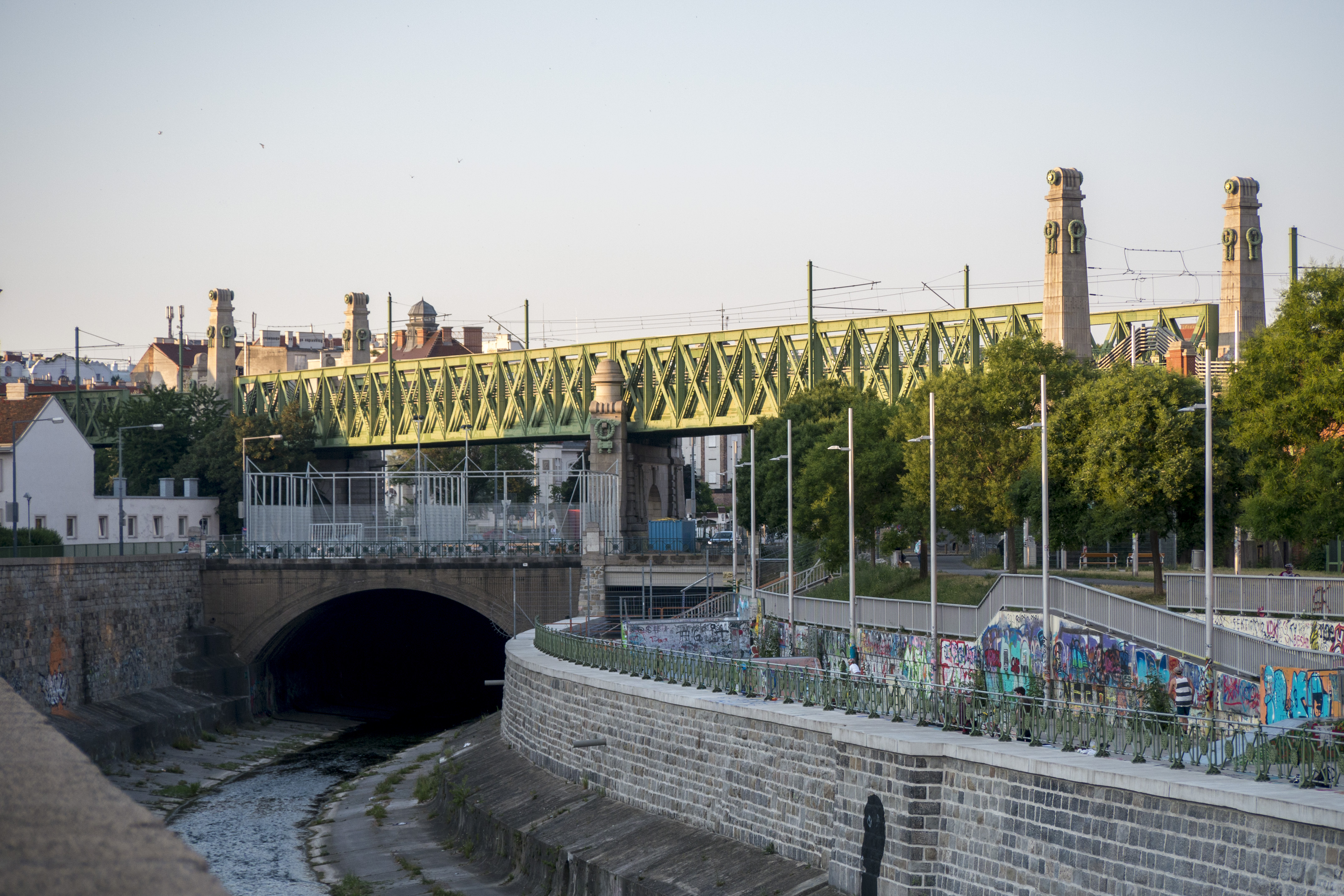 Brücke über die Zeile Westseite